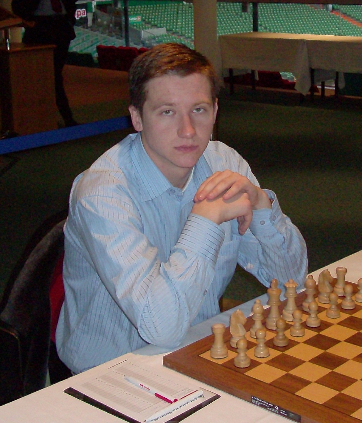 Zahar Efimenko, Ukrainian chess grandmaster